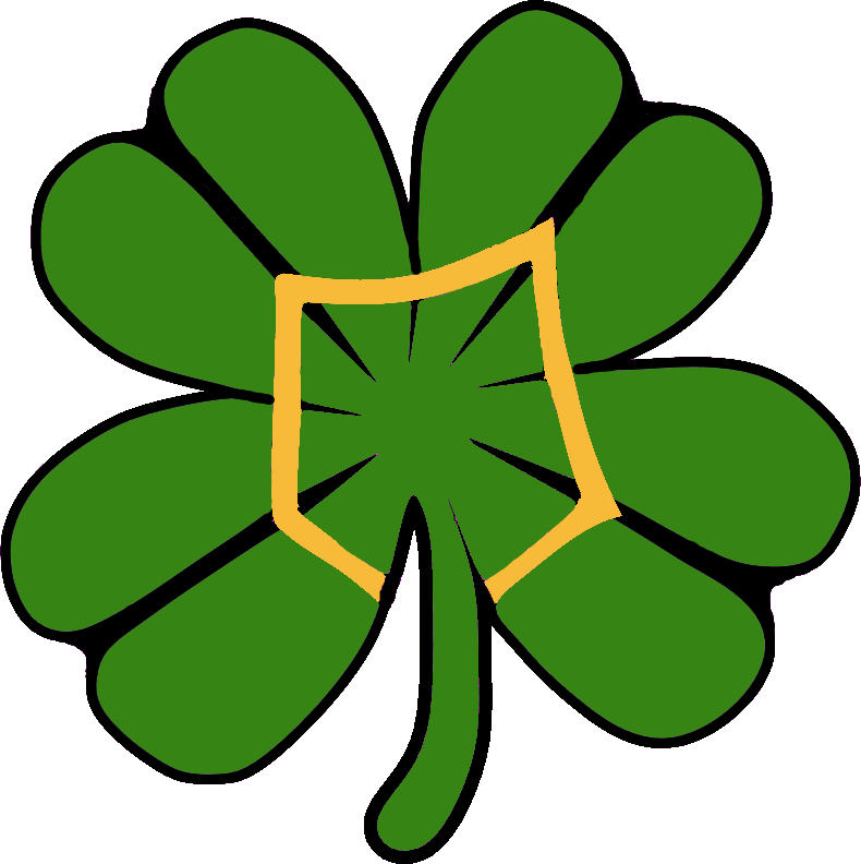 Logo du fabricant d'autos Brasier.